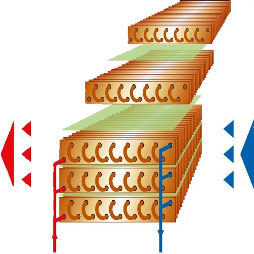 Skizze zum Aufbau eines Gegenstrom-Schichtwärmetauschers Werksbild SEW-GmbH D-47906 Kempen